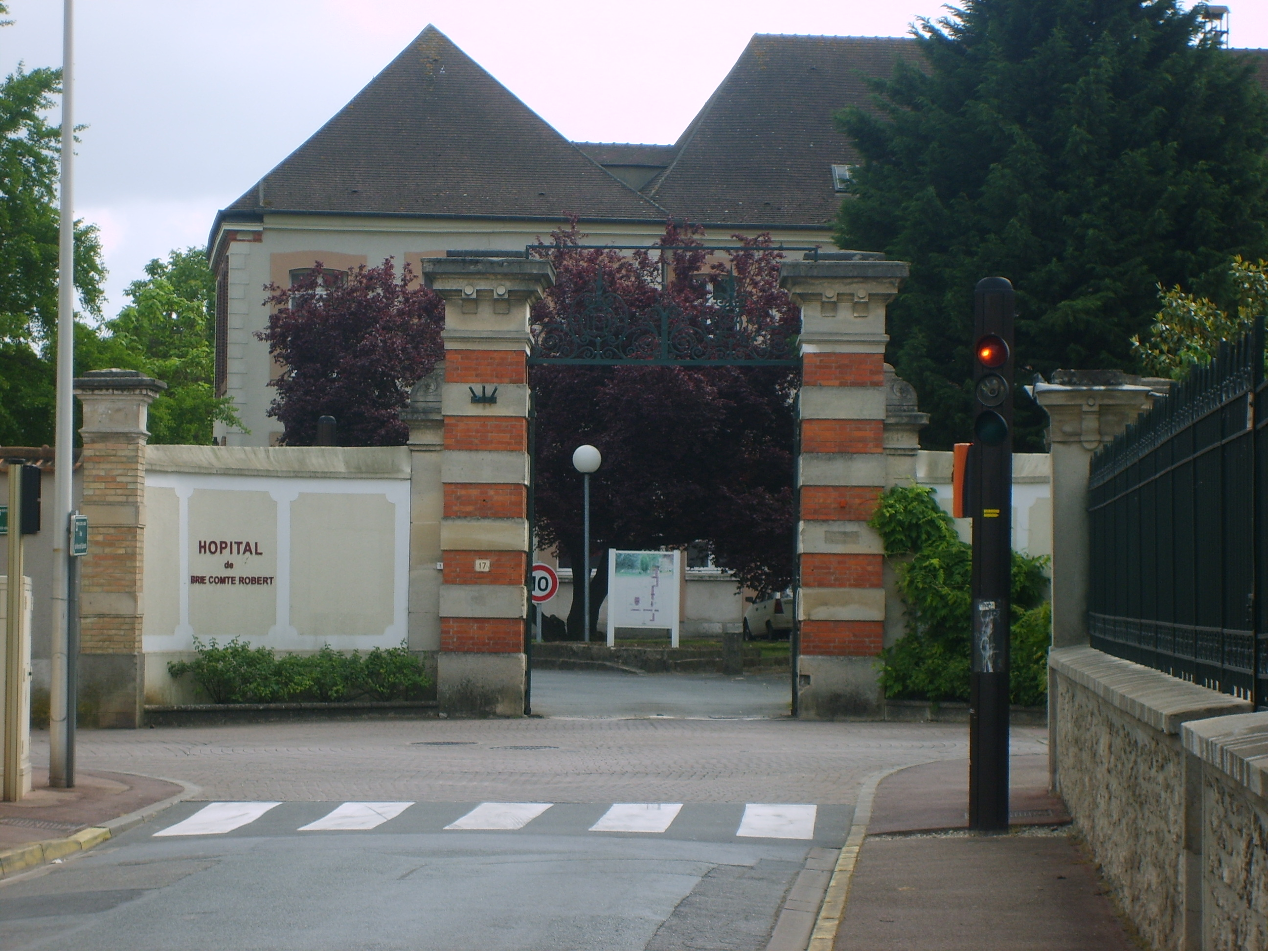 Hopital Local de Brie-Comte-Robert